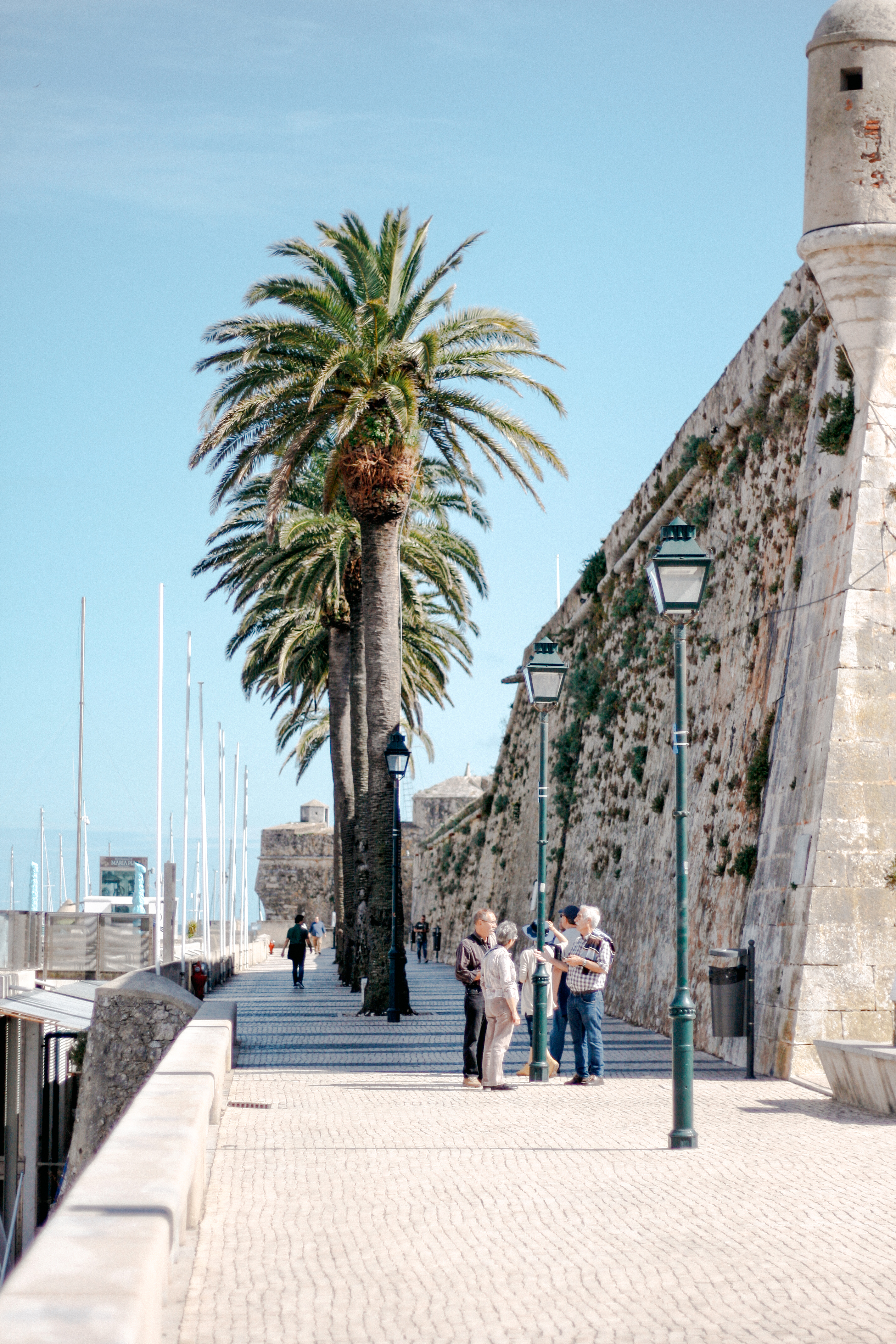 Visão geral.